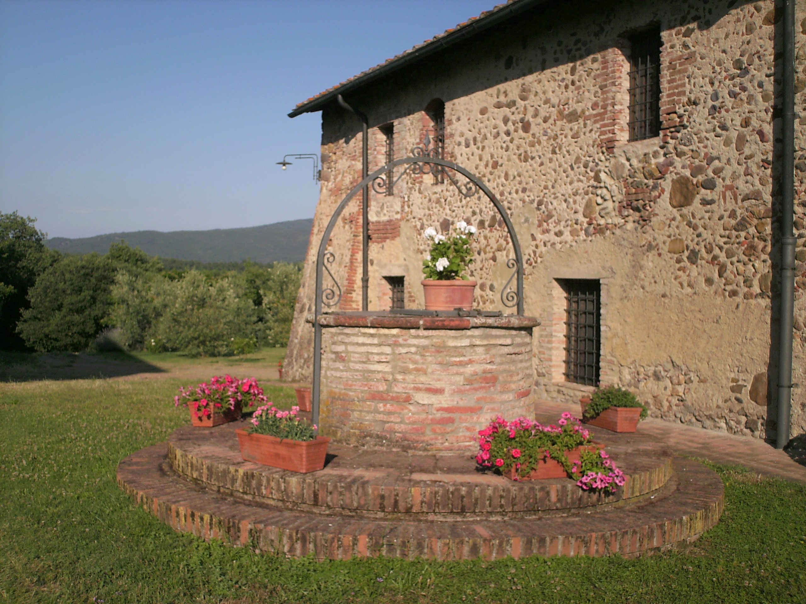 il Poggiale